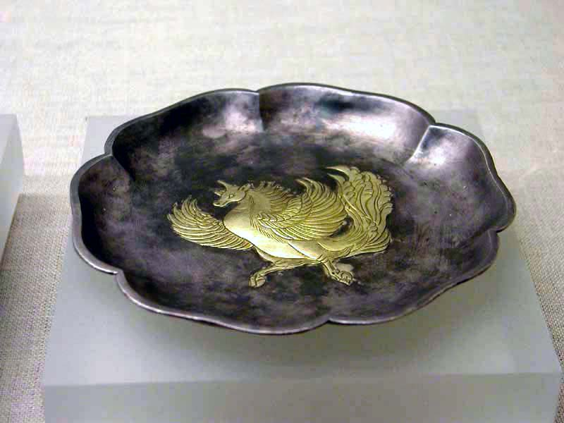 鎏金zh:飞廉纹六曲银盘 本文物zh:1970年发现于zh:陕西zh:西安zh:何家村唐代窖藏，原藏于zh:陕西历史博物馆，藏品号七一44。器高1.4厘米，宽15.3厘米。 User:Mountainzh:2004年zh:7月28日拍摄于zh:北京大学zh:赛克勒考古与艺术博物馆。拍摄者已授权依照GFDL协议发布该图像。